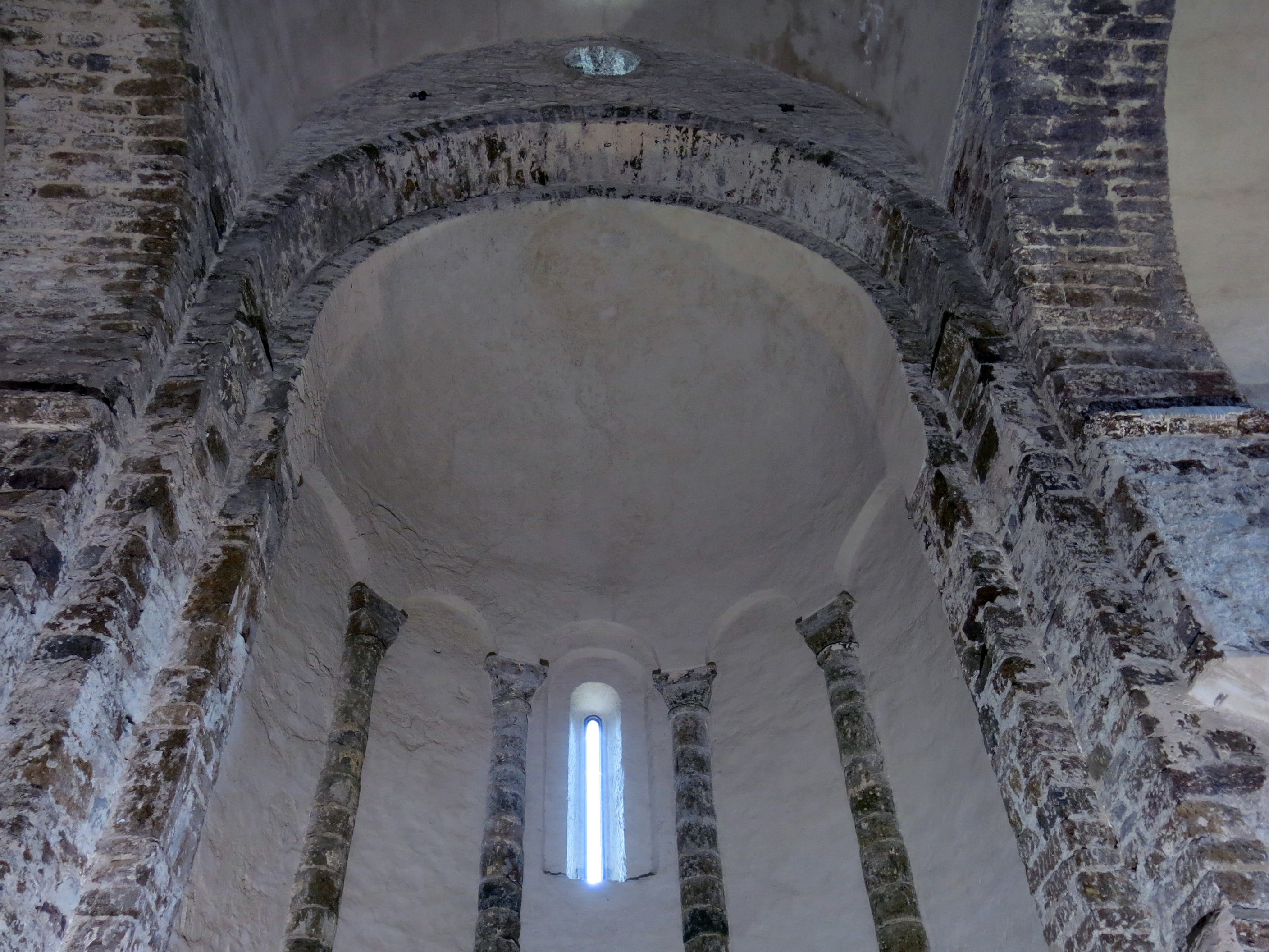 Conjunt monàstic de Sant Quirze de Colera (Rabós)